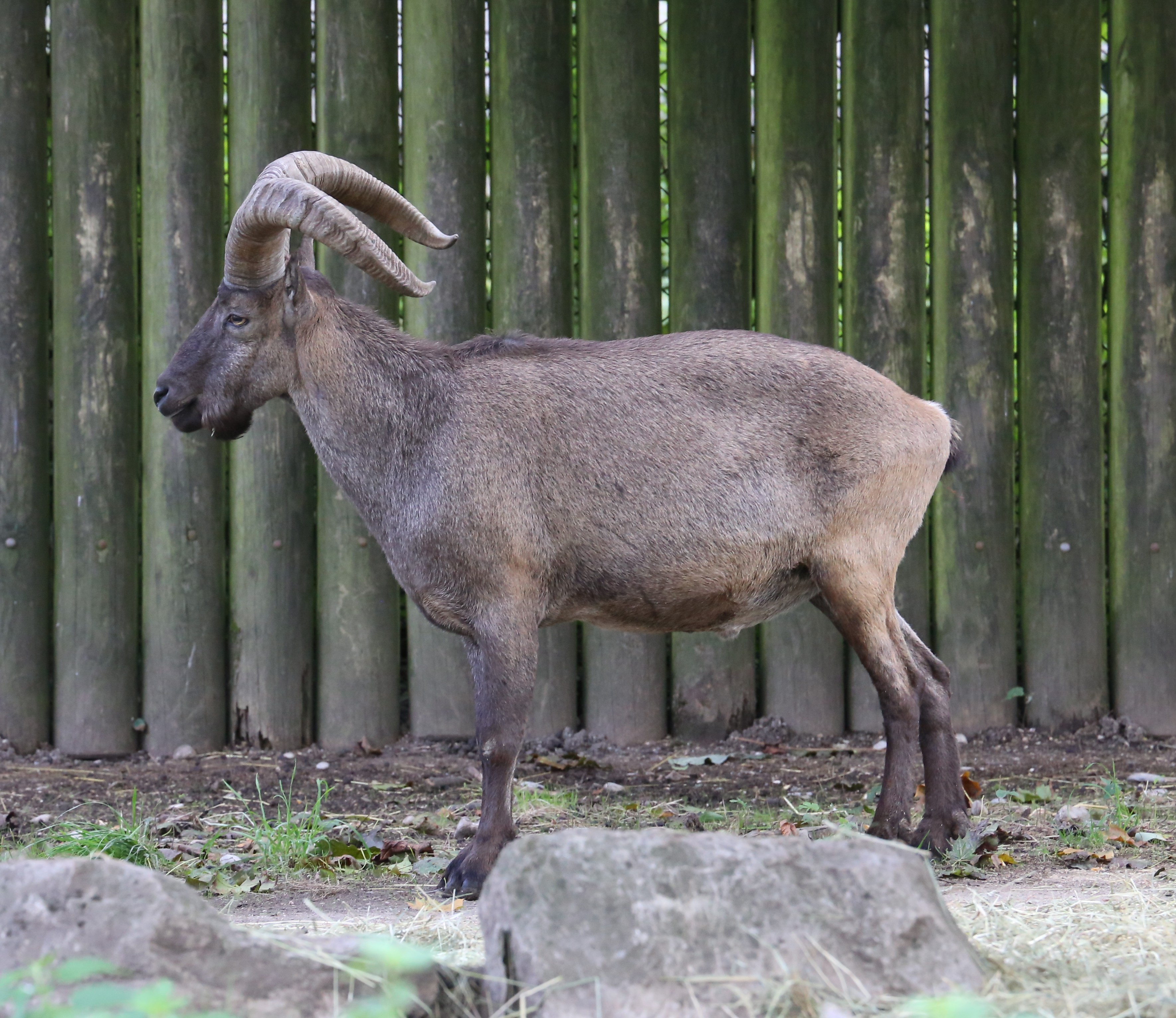 Daghestanischer Tur (Ostkaukasischer Steinbock), Capra cylindricornis, Zoo Augsburg